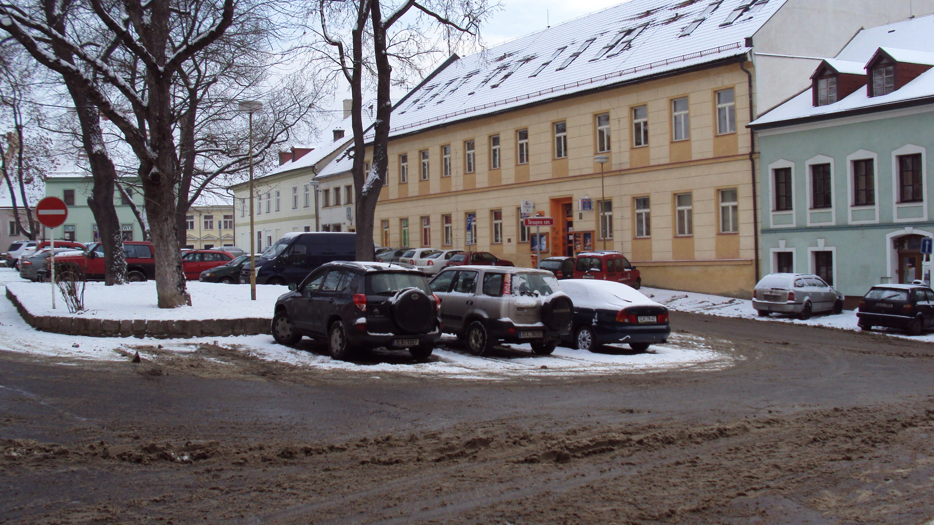 Škroupovo náměstí v České Lípě, pravá strana